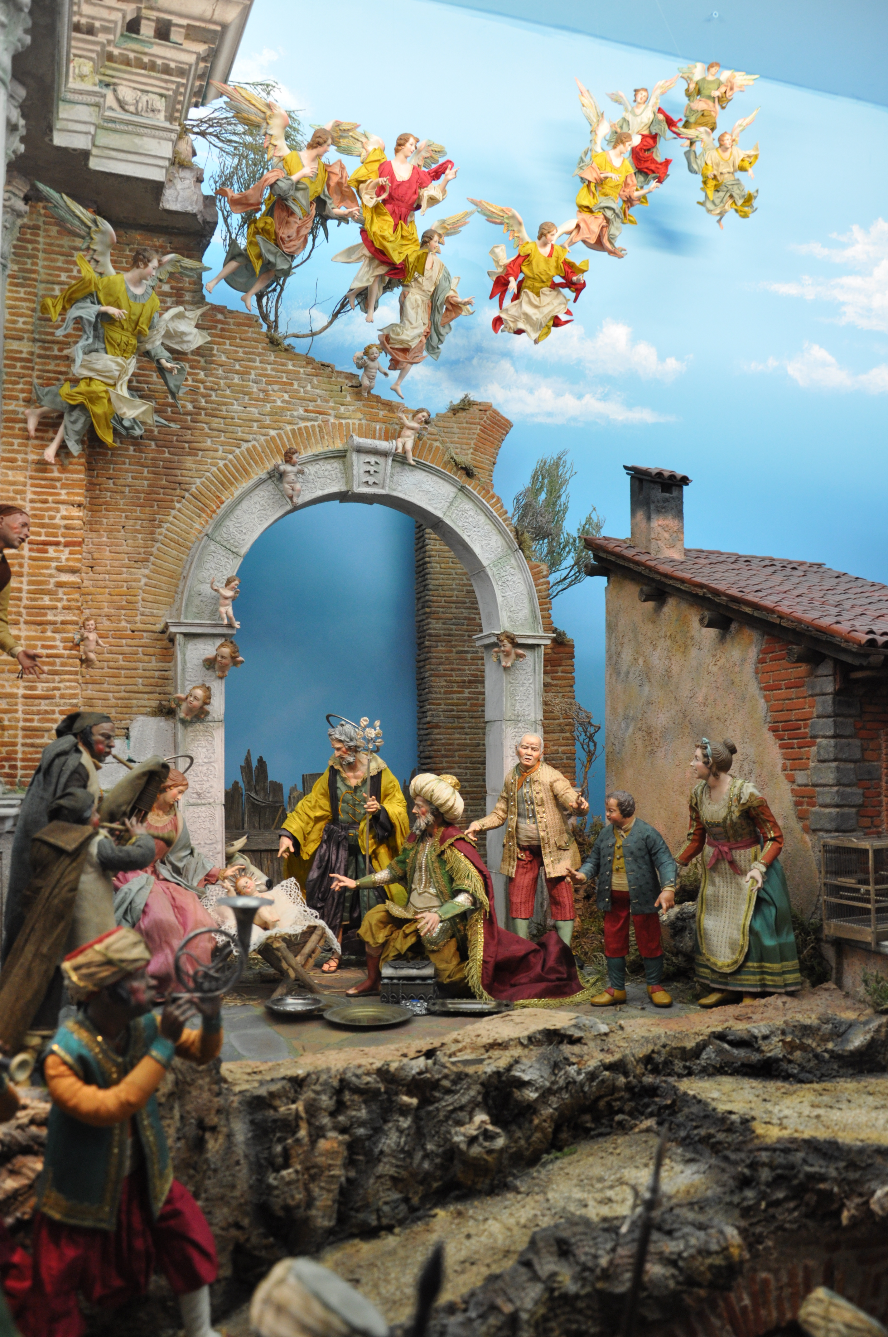 Neapolitanische Krippe im Krippenmuseum Oberstadion; 2013 nach Vorbildern des 18. Jahrhunderts gefertigt